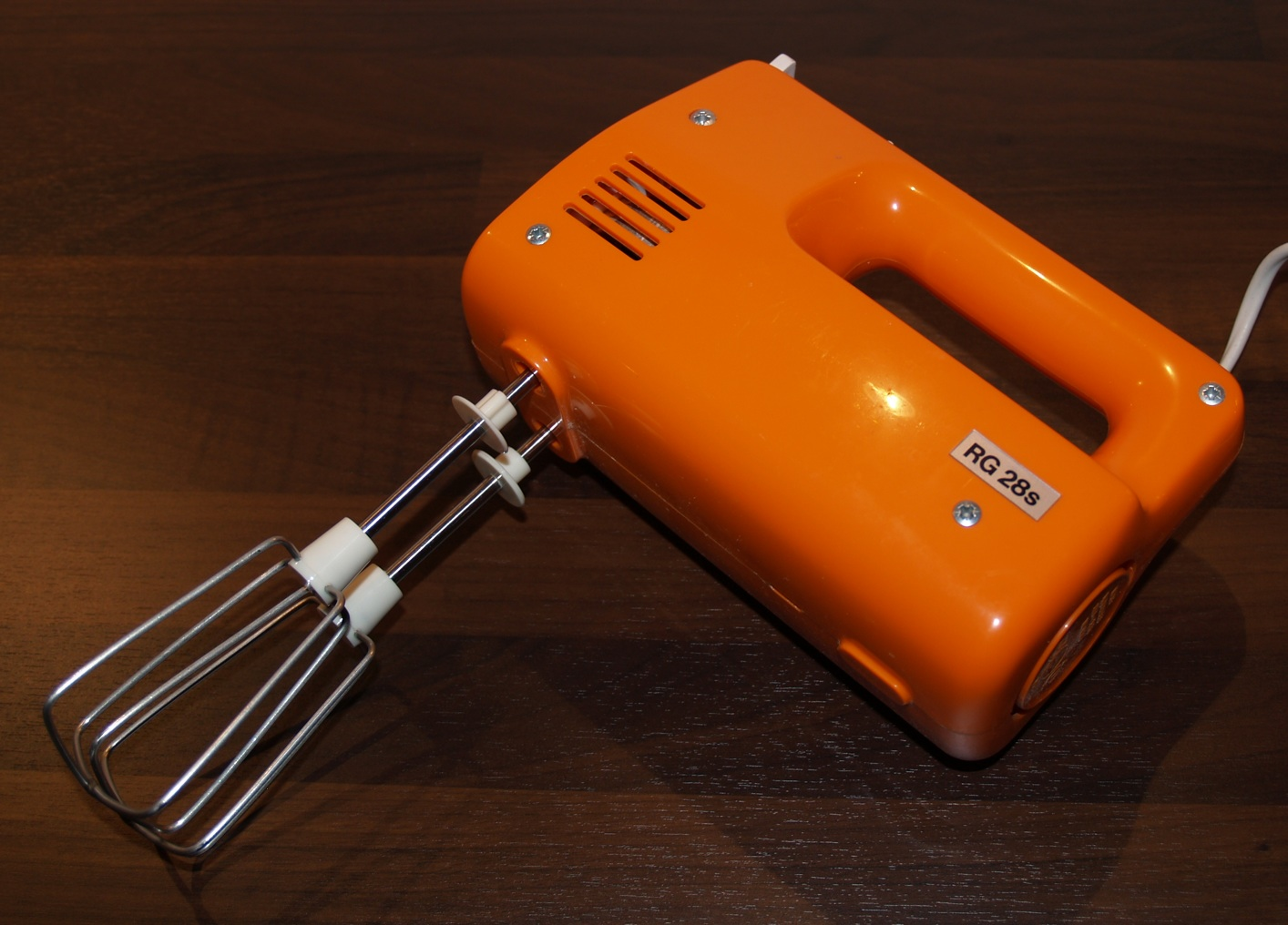 Handrühr- und Mixgerät "AKA electric RG28s", VEB Elektrogerätewerk Suhl, DDR